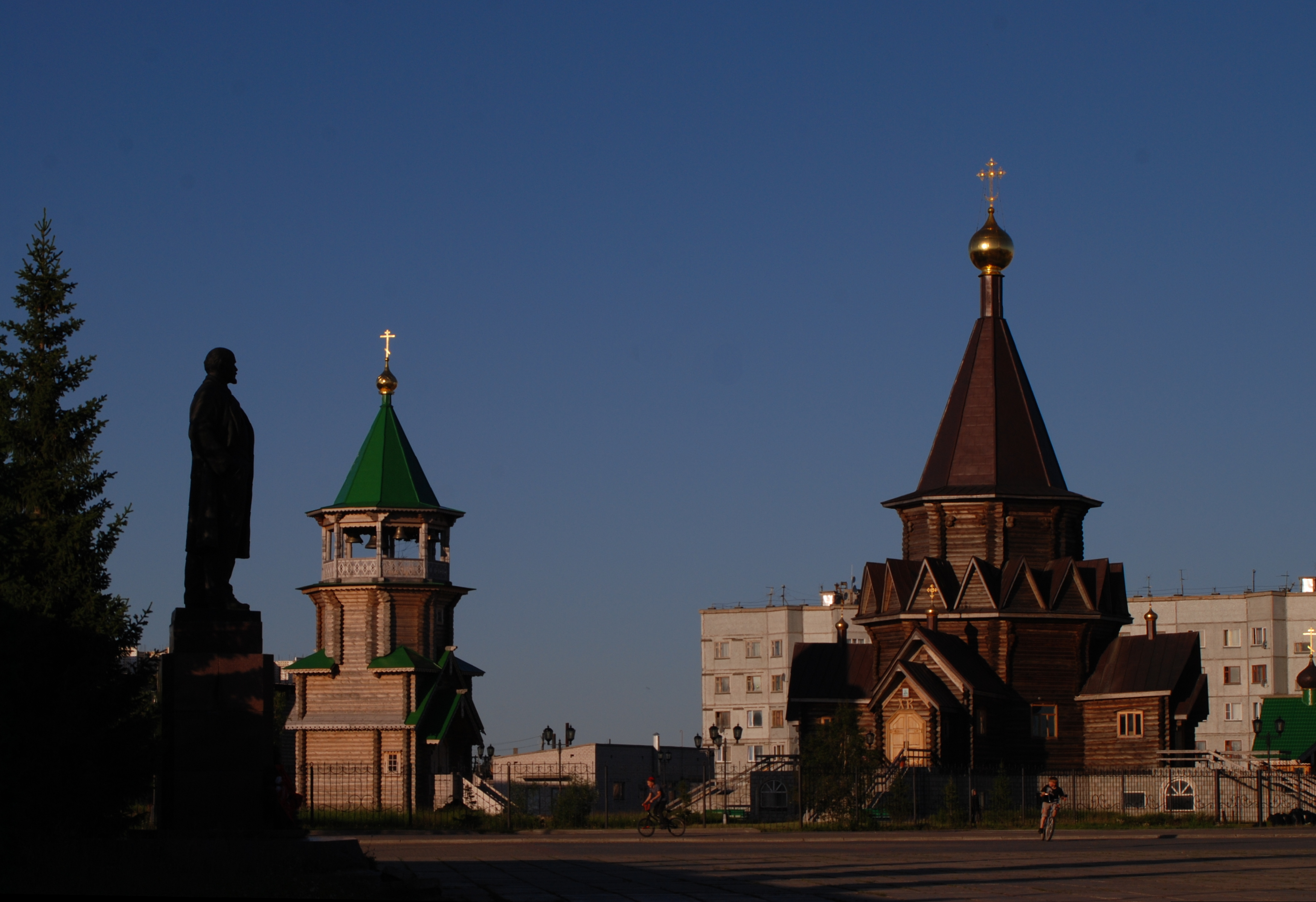 Нарьян Мар